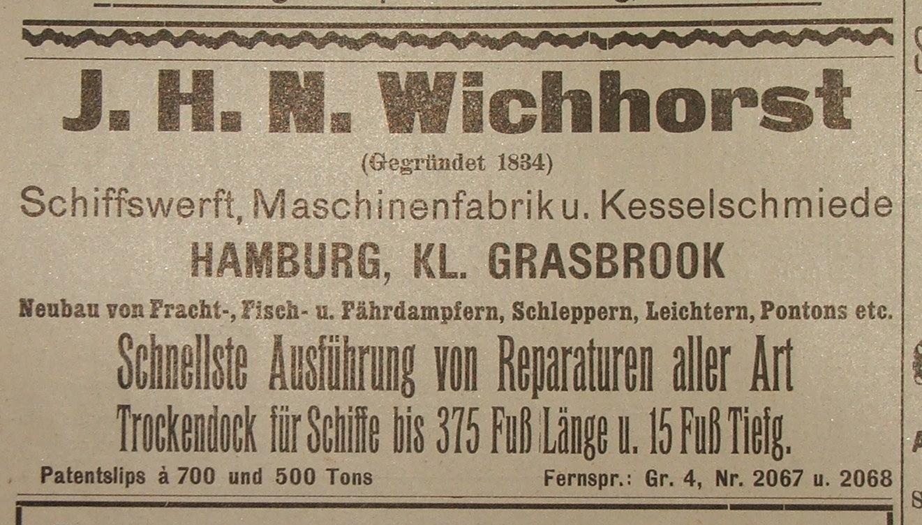 Werbung der Wichhorst Werft in der Fachzeitschrift Hansa von 1913